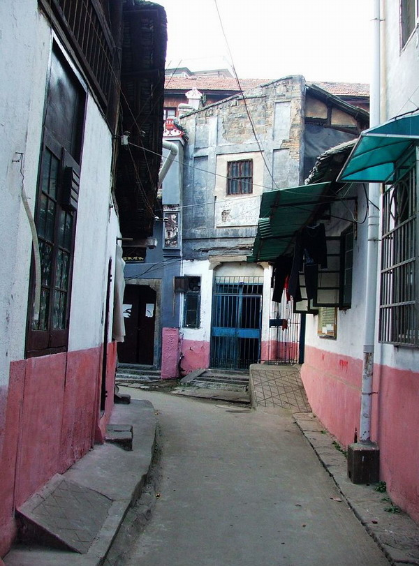 秋瑾故居